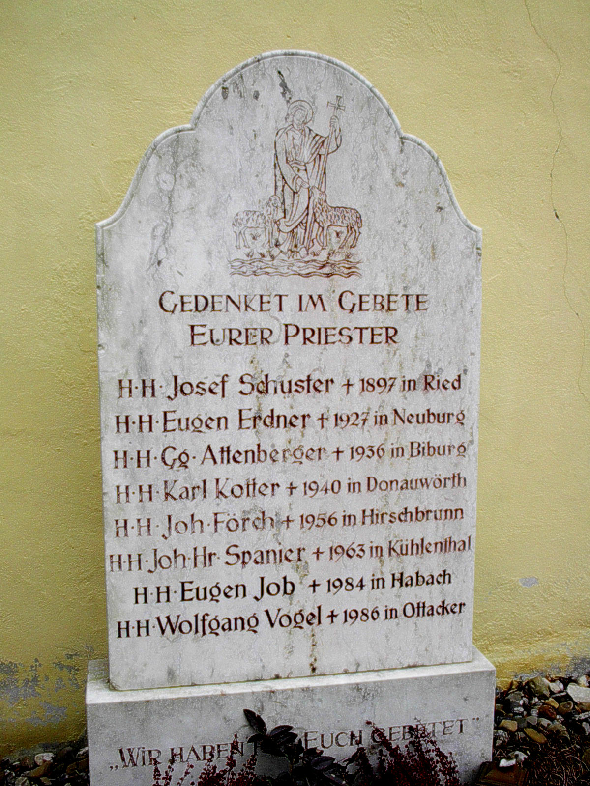 Auf dem Priestergrab ist Eugen Erdner in Ried ein Denkmal gesetzt.